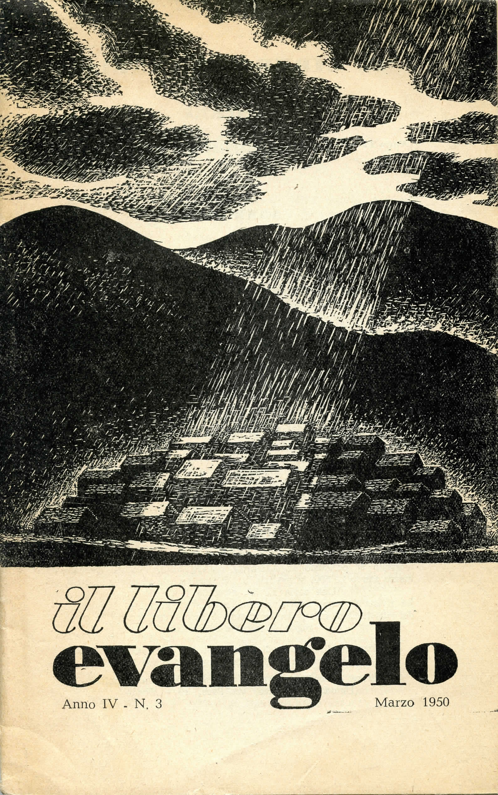 Copertina della Rivista "Libero Evangelo" del 1950 con xilografia di Ugo Gastaldi.